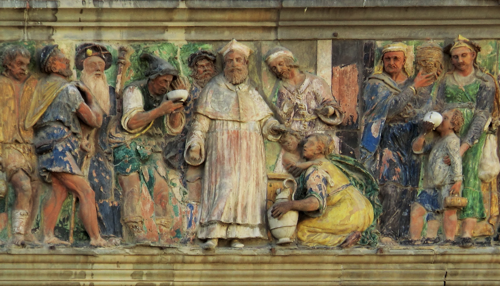 Ospedale del Ceppo, Pistoia, Italy